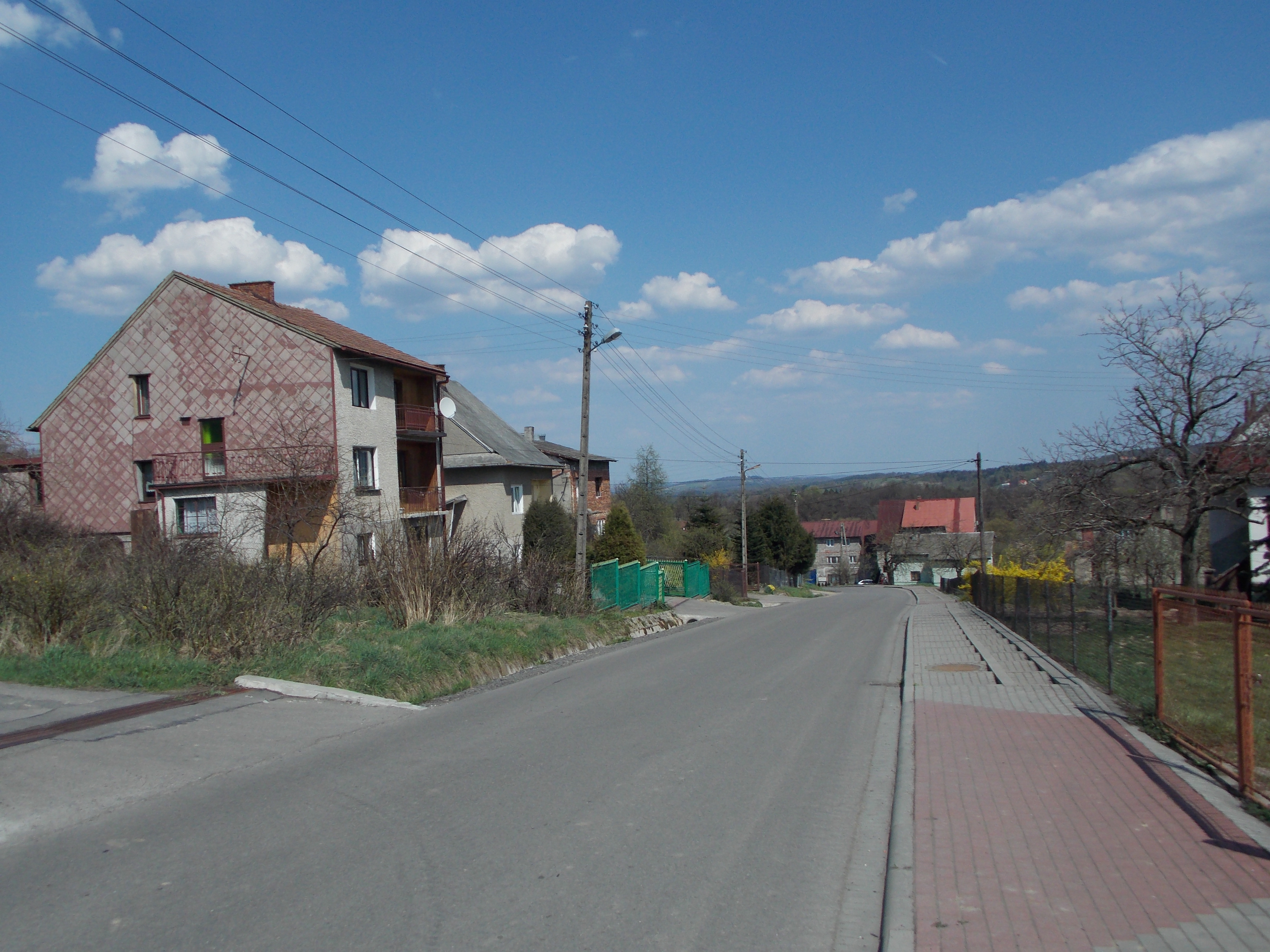 Село Бугай, Вадовицкого повята, Малопольское воеводство